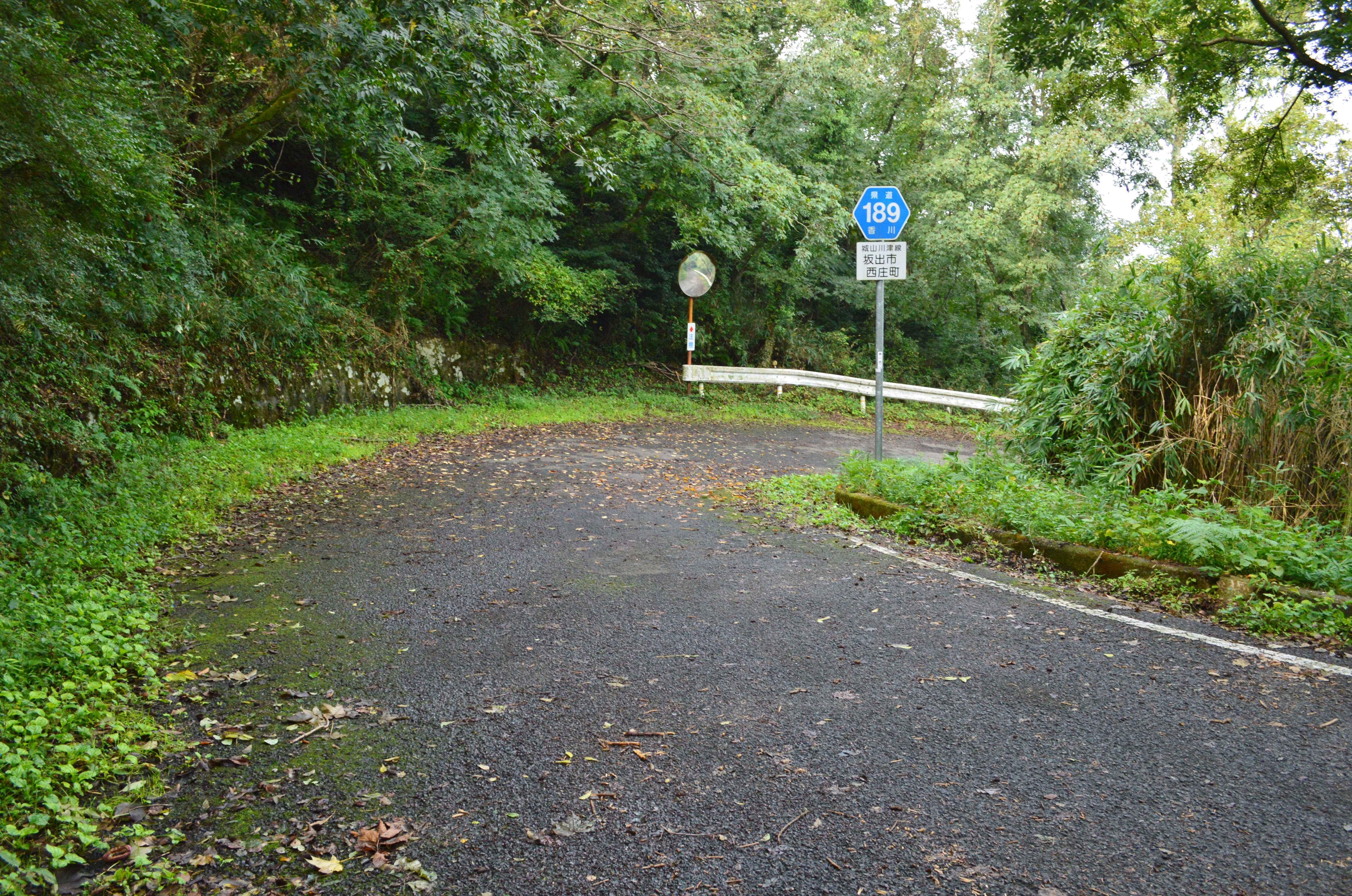 香川県道188号 (城山山中)（ファイル名の「Kagawai」は「Kagawa」の誤り）